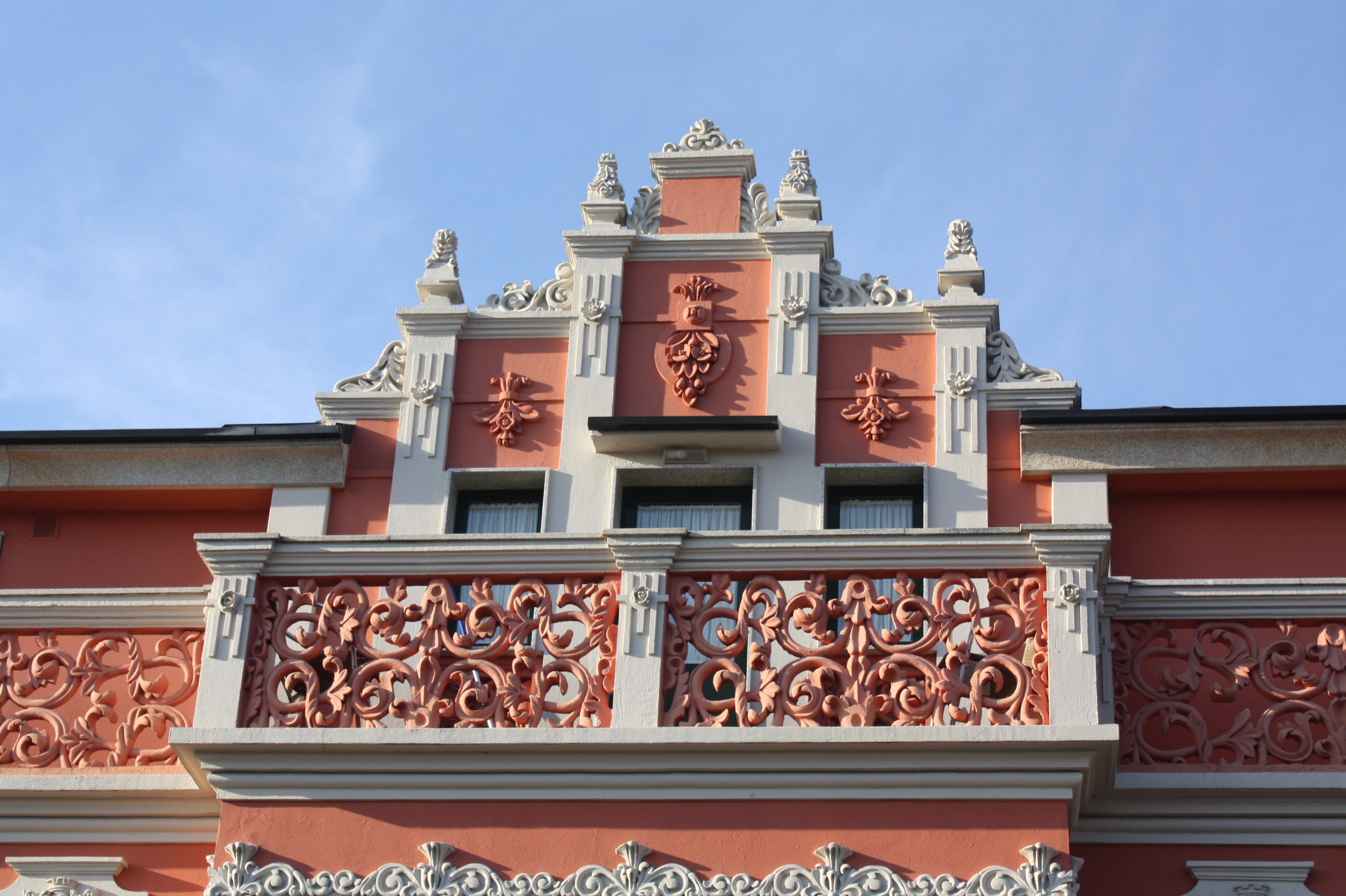 Edificio con decoración modernista no lugar da Granxa, parroquia de Dorrón, concello de Sanxenxo (Pontevedra)